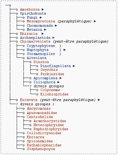 Eukaryota_Classification_proposée_par_Adl_et_al